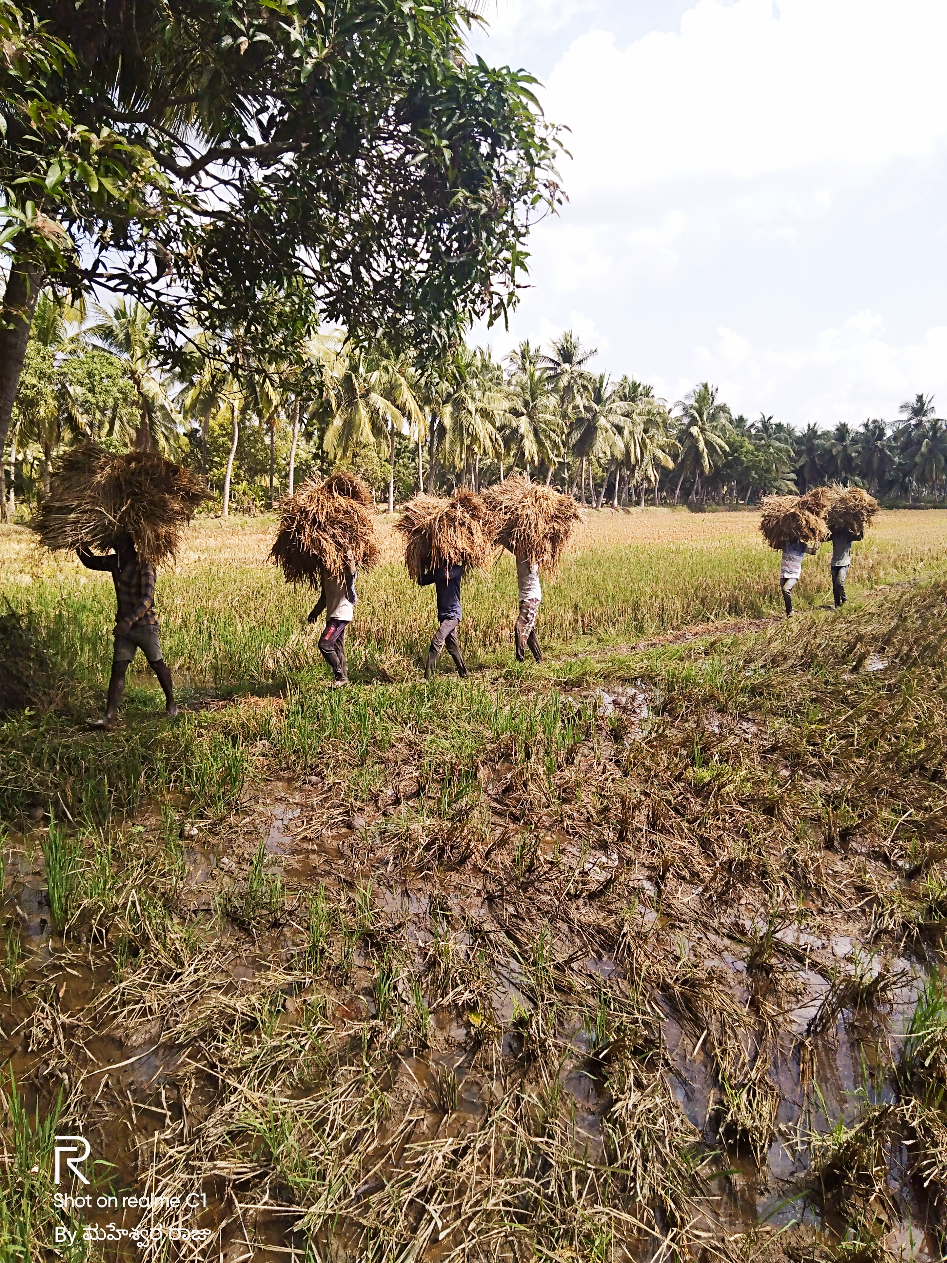 వరి మోపులు చేను నుండి ఇంటికి చేరుస్తున్నా దృశ్యం